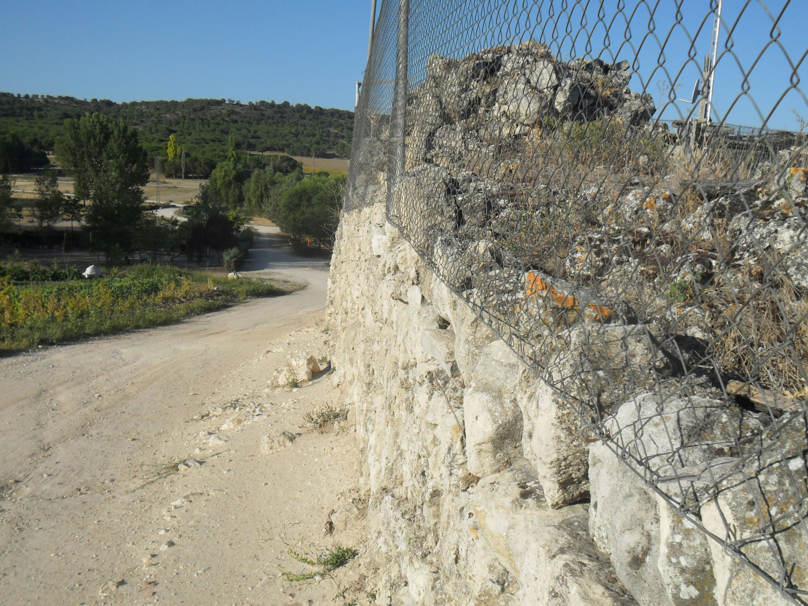 Distintos estratos históricos del yacimiento